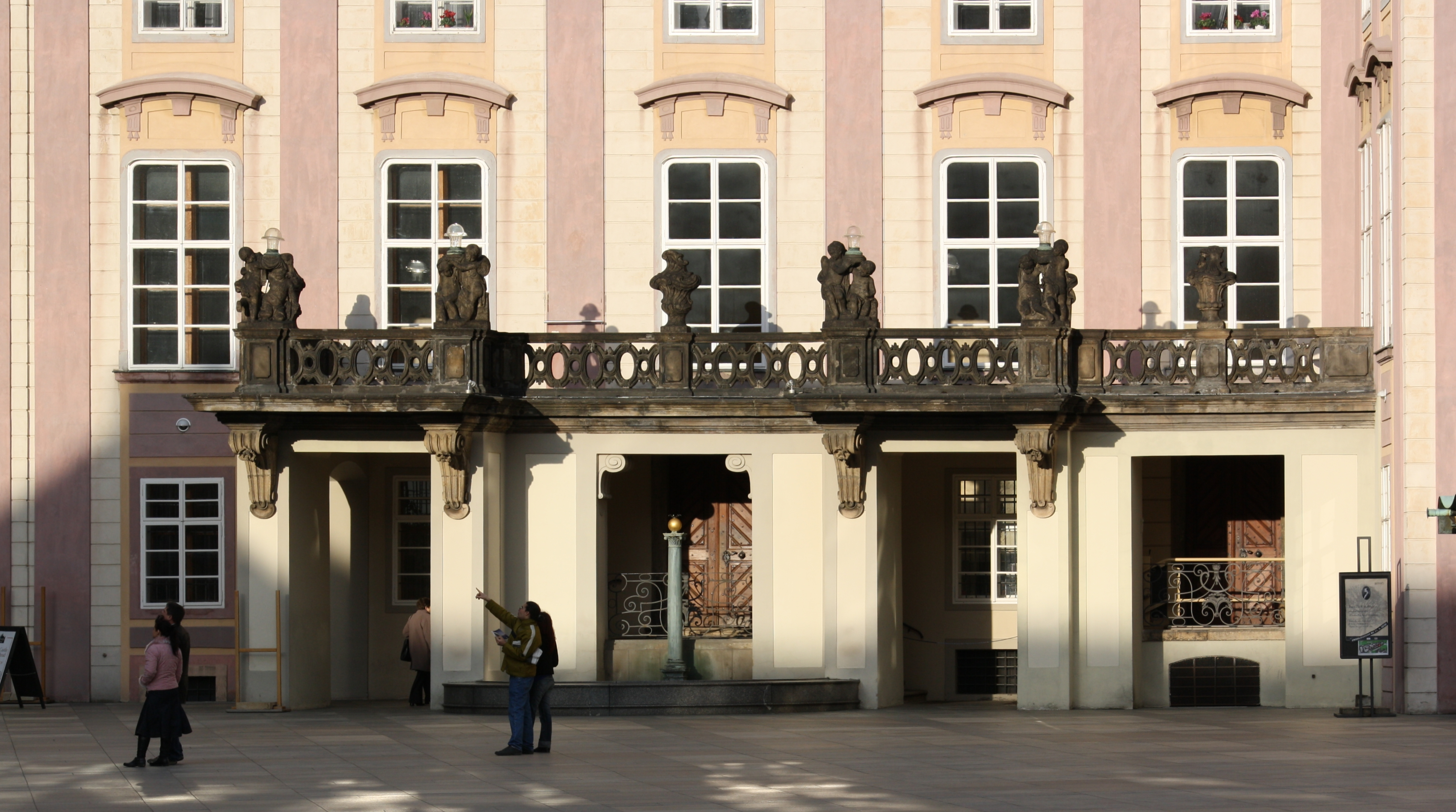 Pražský hrad - Nový královský palác, detail fasády